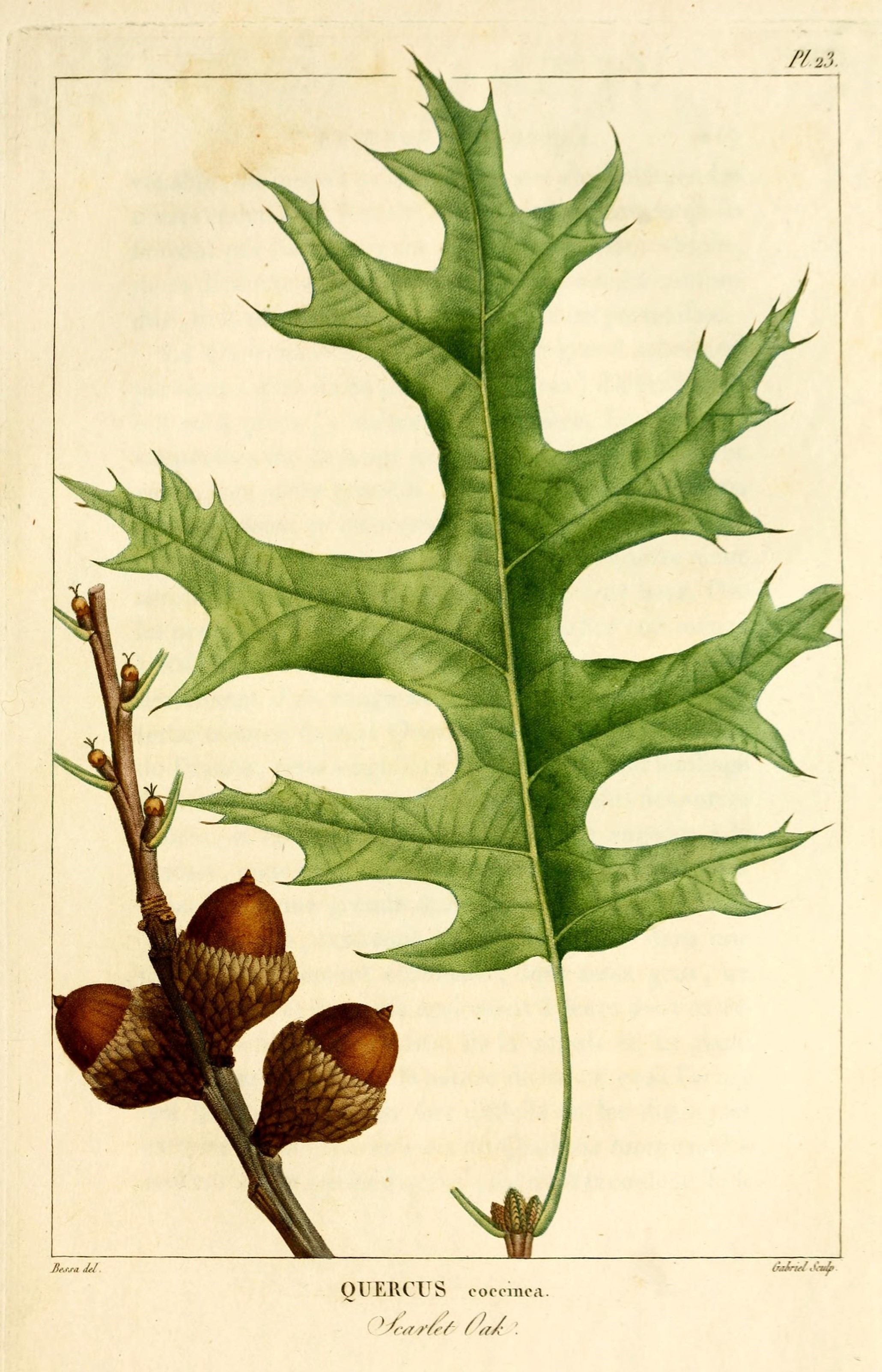 Ji,..^a .U dtiru/ Si-m^ OUEllCrS oocomci.